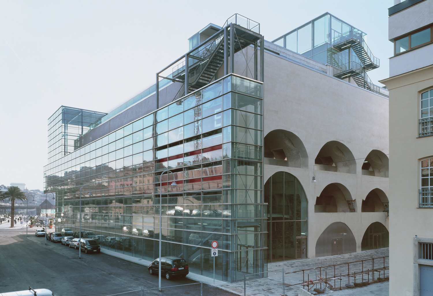 Museo del Mar de Genova